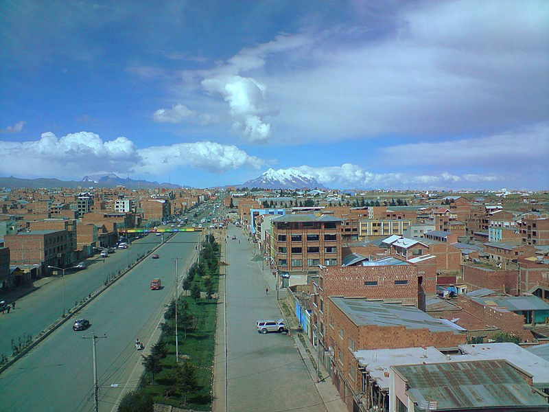 UNA VISTA DEL MAJESTUOSO ILLIMANI DESDE LA AV. JUAN PABLO II DE LA CIUDAD DE EL ALTO, LA PAZ - BOLIVIA